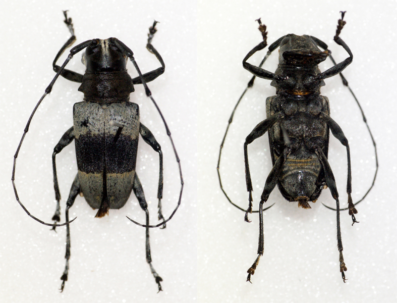 Quedenfeldt,1882 Sex: ? Data: 08-2008 - Ebogo - Cameroon Size: ?